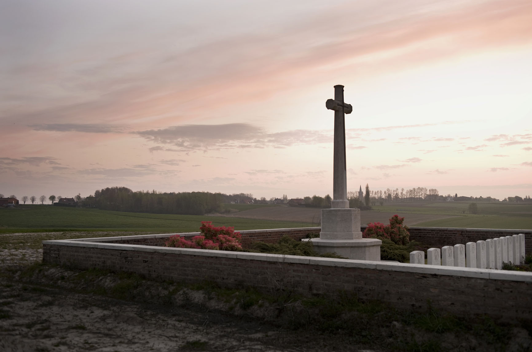 Spanbroekmolen Brits Militaire Begraafplaats (WO I) tussen Wijtschate en Wulvergem (Heuvelland).